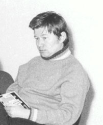 Václav Havel a Václav Sloup - autorské čtení v PNP, 1969